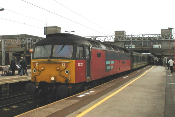 47757 at Stafford